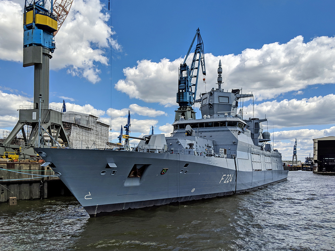 Fregatte Sachsen Anhalt (F 224) im Hamburger Hafen, 30. Juni 2018